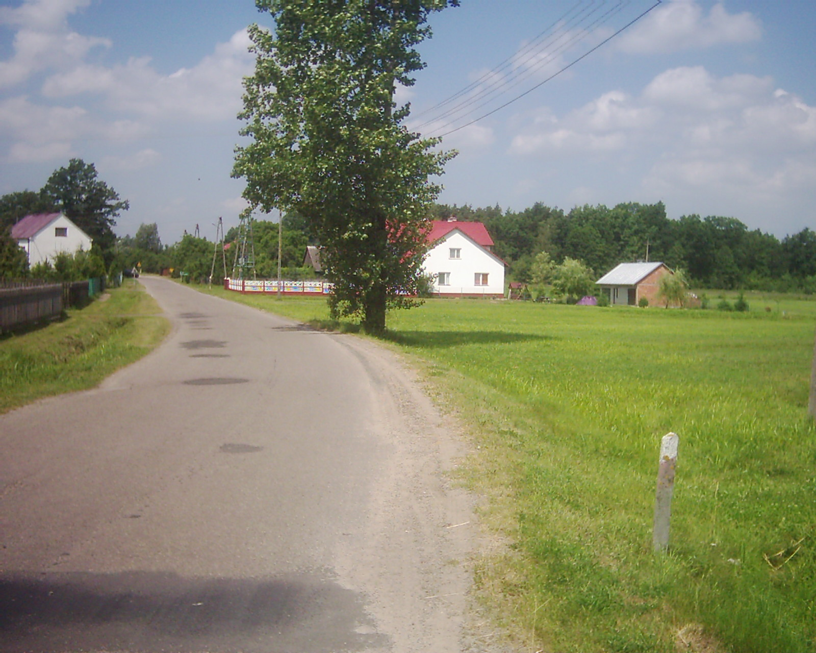 Jedna z ulic w Komorowie, podkarpackie.